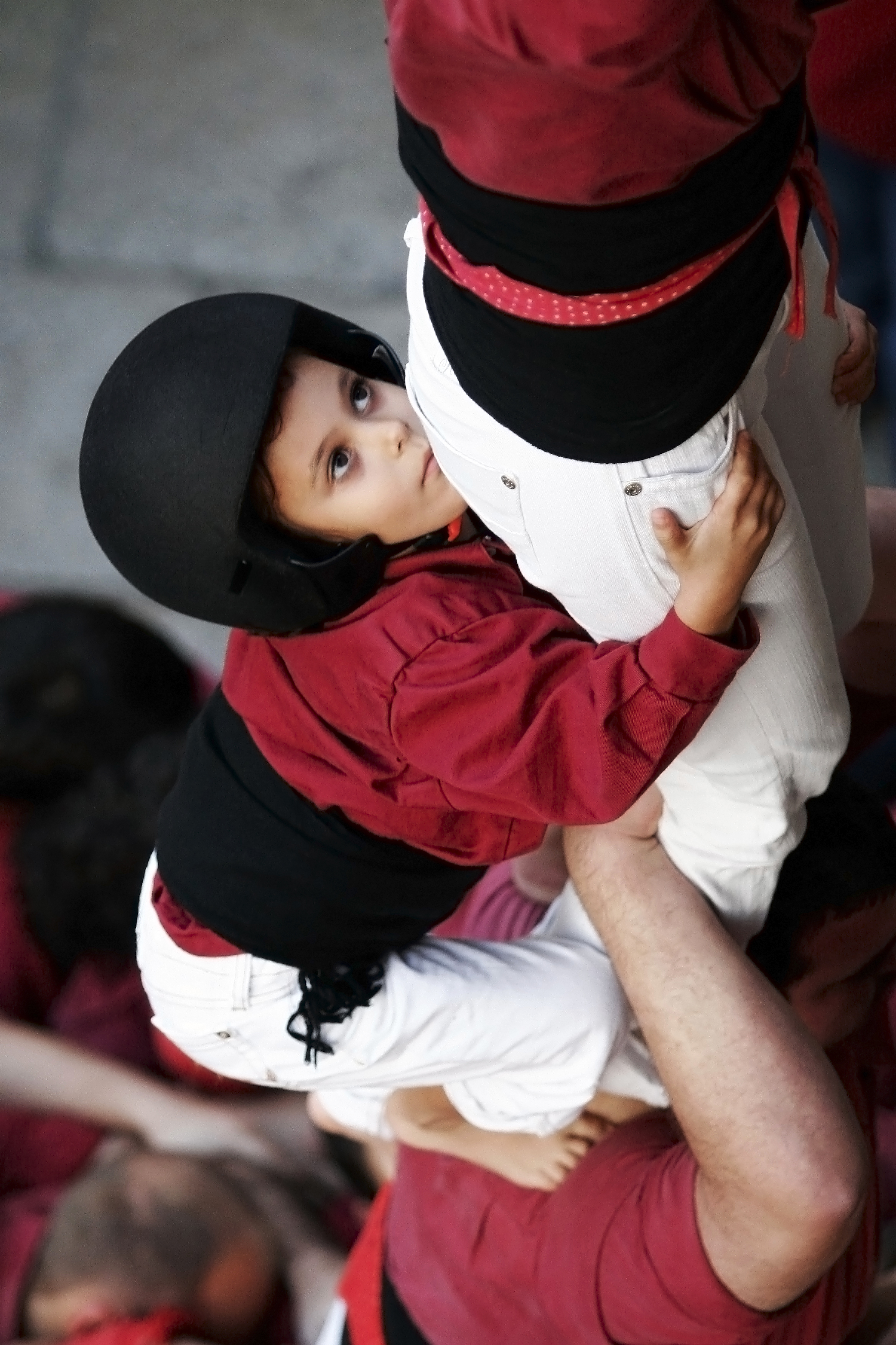 Enxaneta dels Castellers de Mallorca